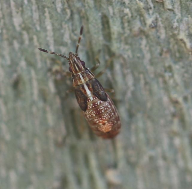 Nymphe von Belonochilus numenius am 25. Juni 2020 an einer Platane an der Côte d’Azur